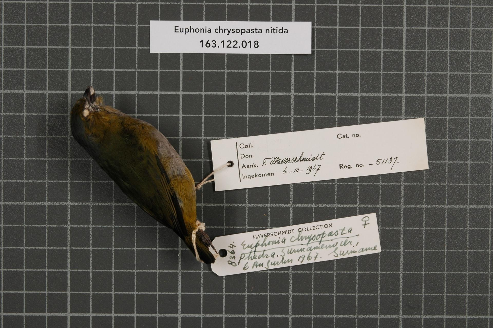 Euphonia chrysopasta nitida (Penard, 1923)